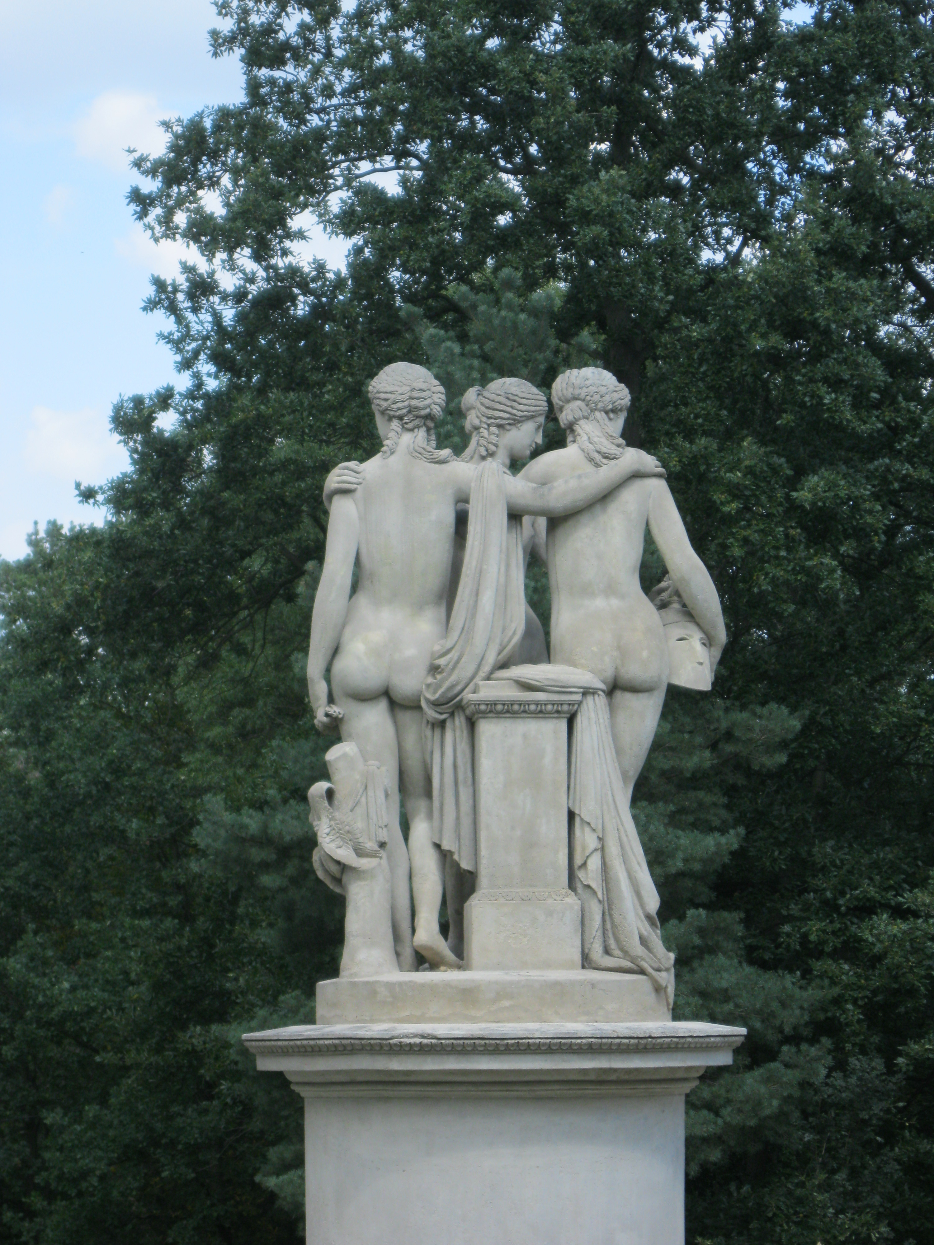 Letohrádek Chrámek Tří Grácií (Charvátská Nová Ves), Charvátská Nová Ves